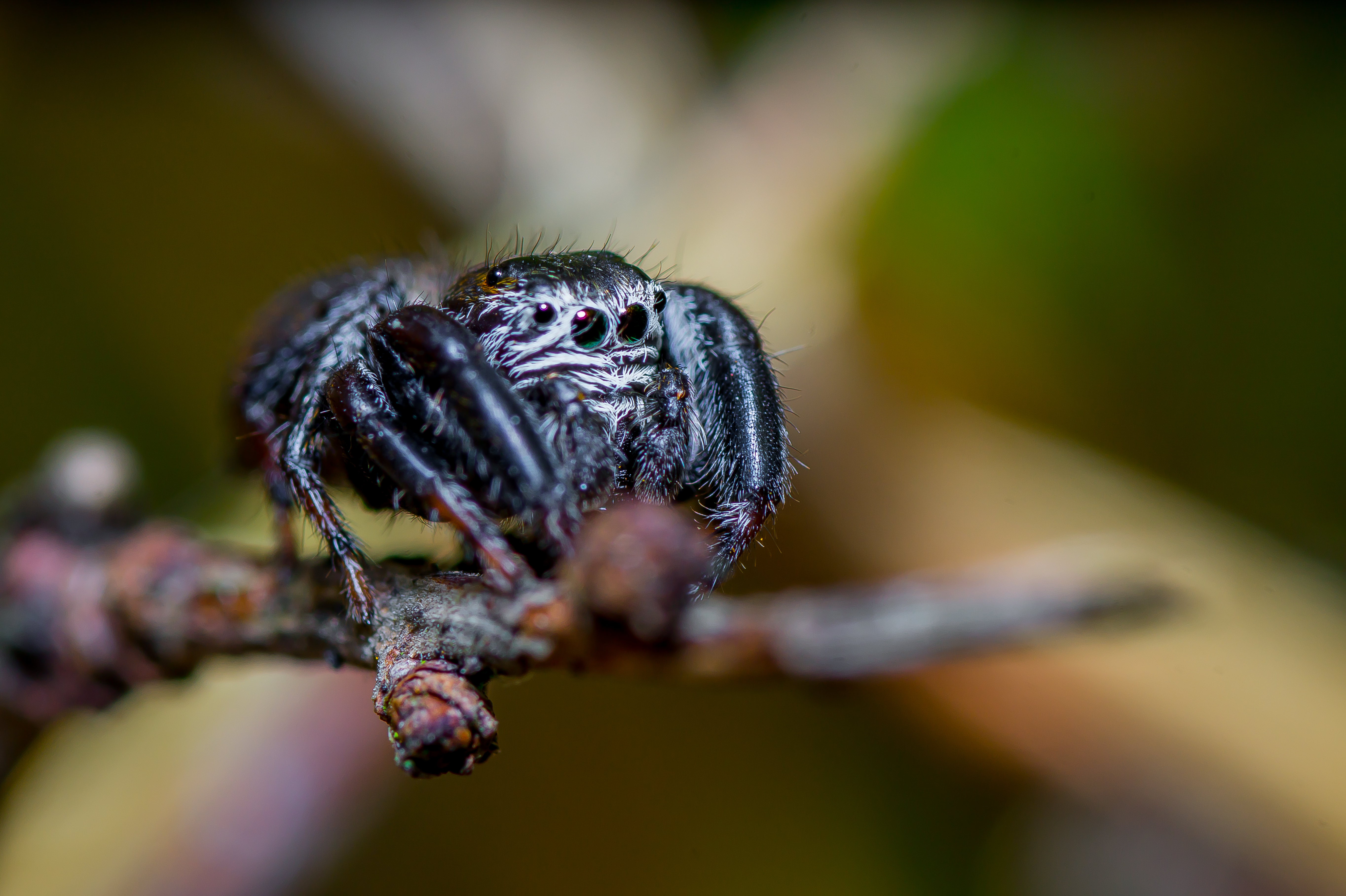 Eine ca. 5mm kleine männliche Evarcha arcuata aus dem Jahr 2016, aufgenommen in der Wahner Heide (NRW).